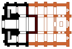 Planta de la Iglesia de San Miguel de Lillo. Oviedo (Asturias, España).